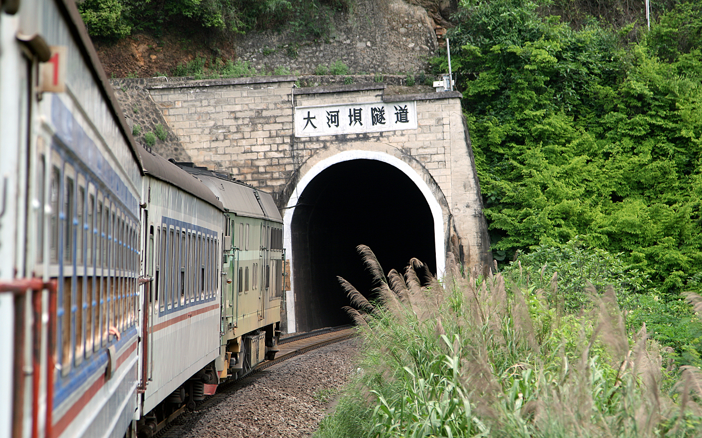 东风4型柴油机车牵引客车行驶于广茂铁路大河坝隧道